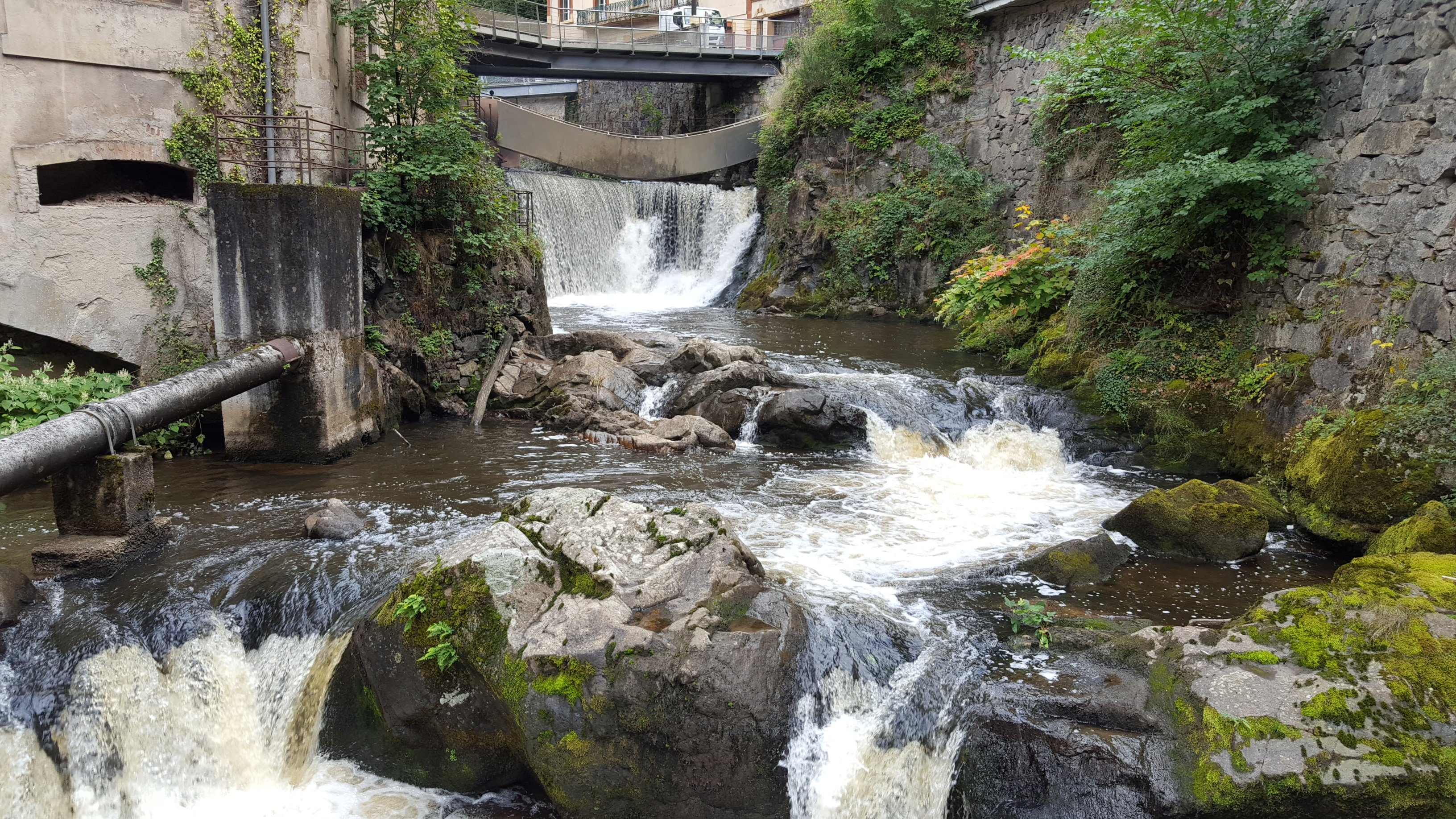 Centre d'art contemporain Thiers